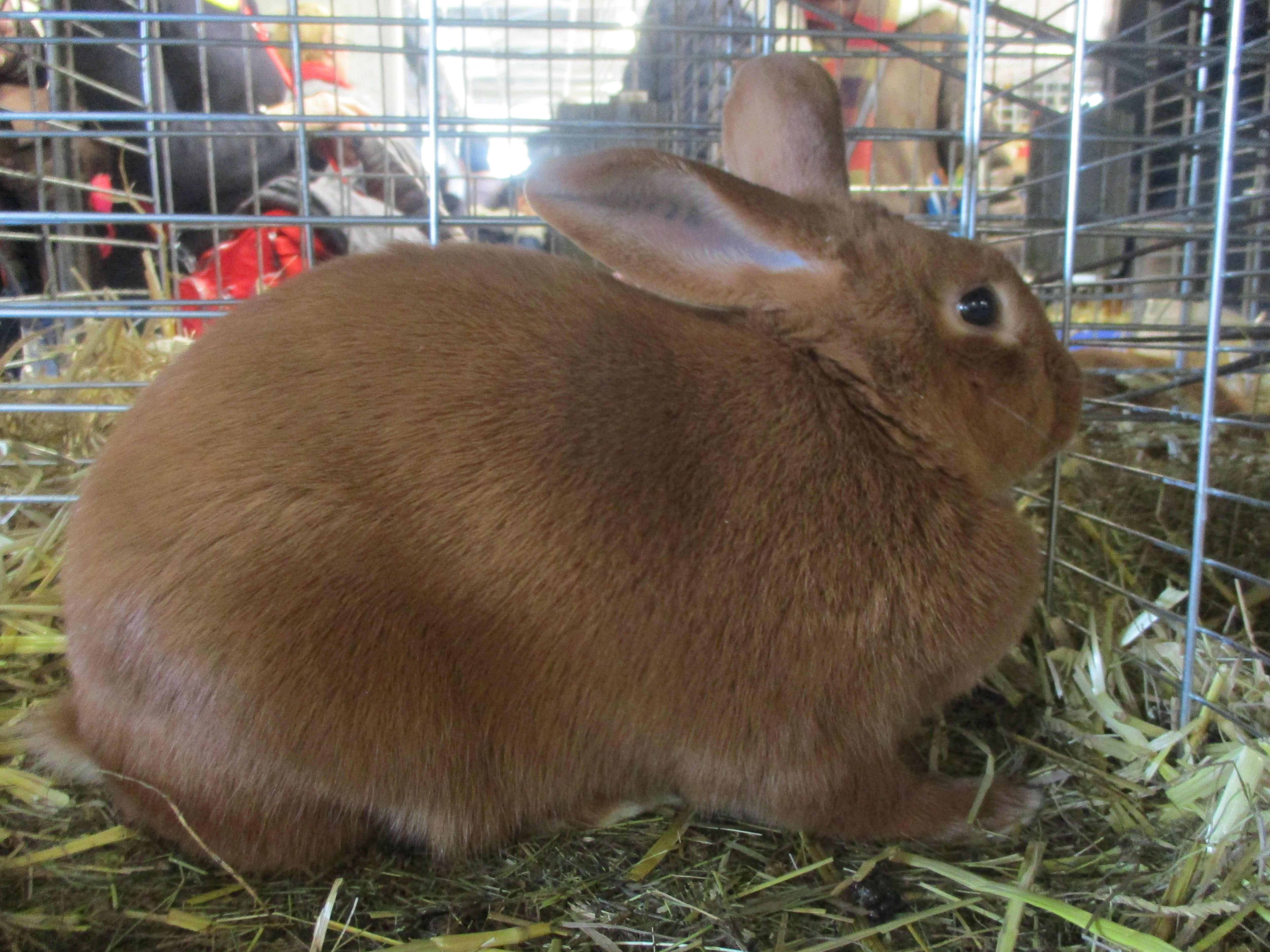 Lapin roux. SDA 2018.